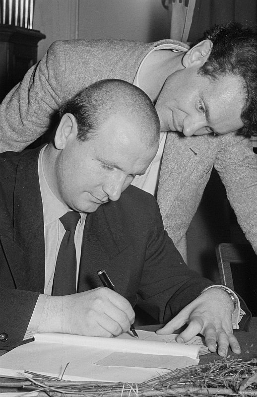 Original image description from the Deutsche FotothekDoppelportrait der Schauspieler Günther Simon und Hans-Peter Minetti